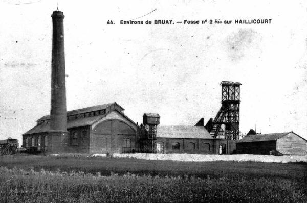 Fosse 2bis d'Haillicourt faisant partie de la Compagnie des mines de Bruay